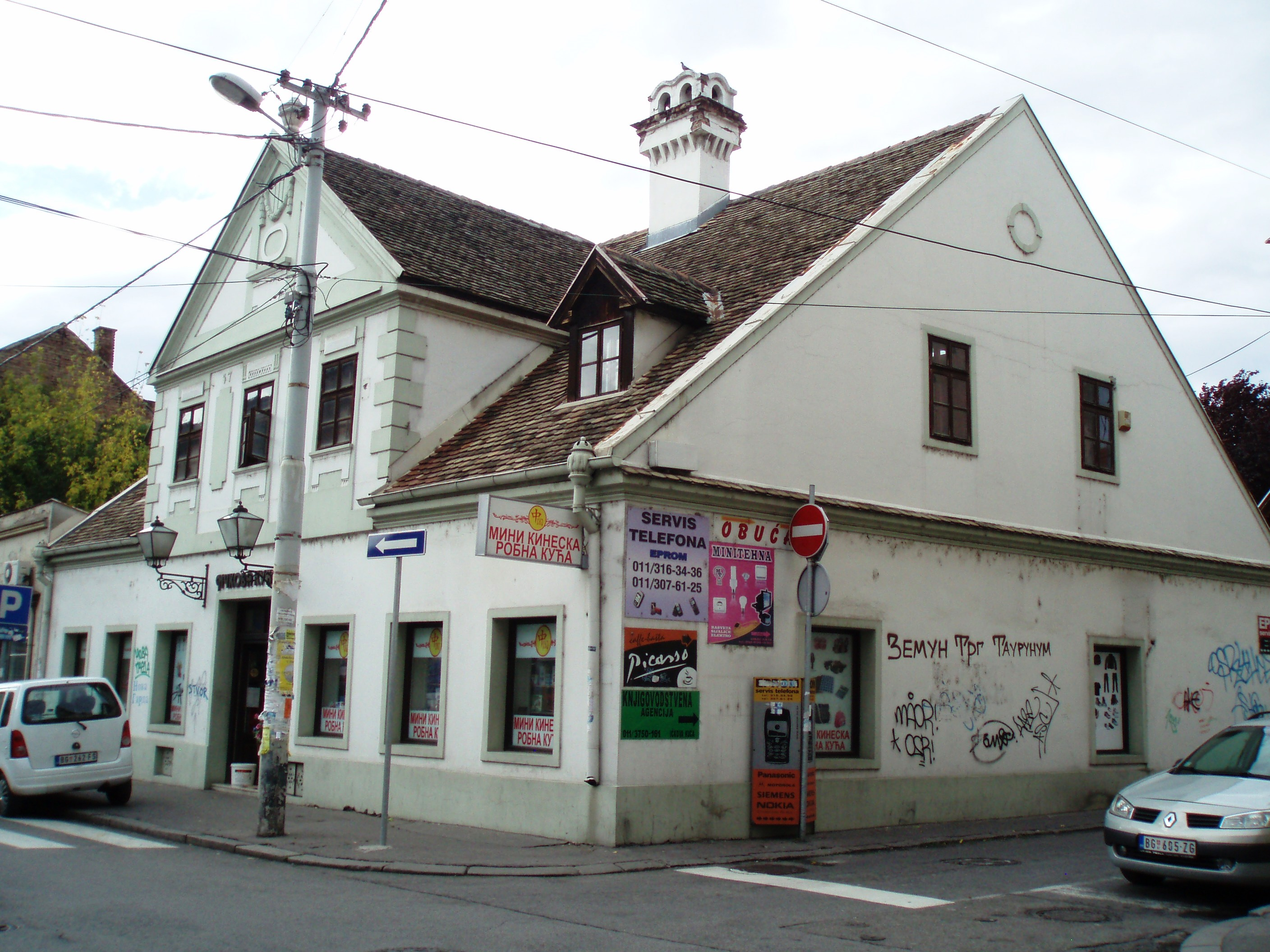 Ičkova kuća pogled sa ugla Bežanijske i Svetosavske ulice, autor fotografije: Nicolo